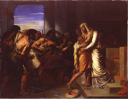 Joseph-Fortuné-Séraphin Layraud, Joseph se fait reconnaître par ses frères, 1863, Paris, Ecole Nationale Supérieure des Beaux-Arts